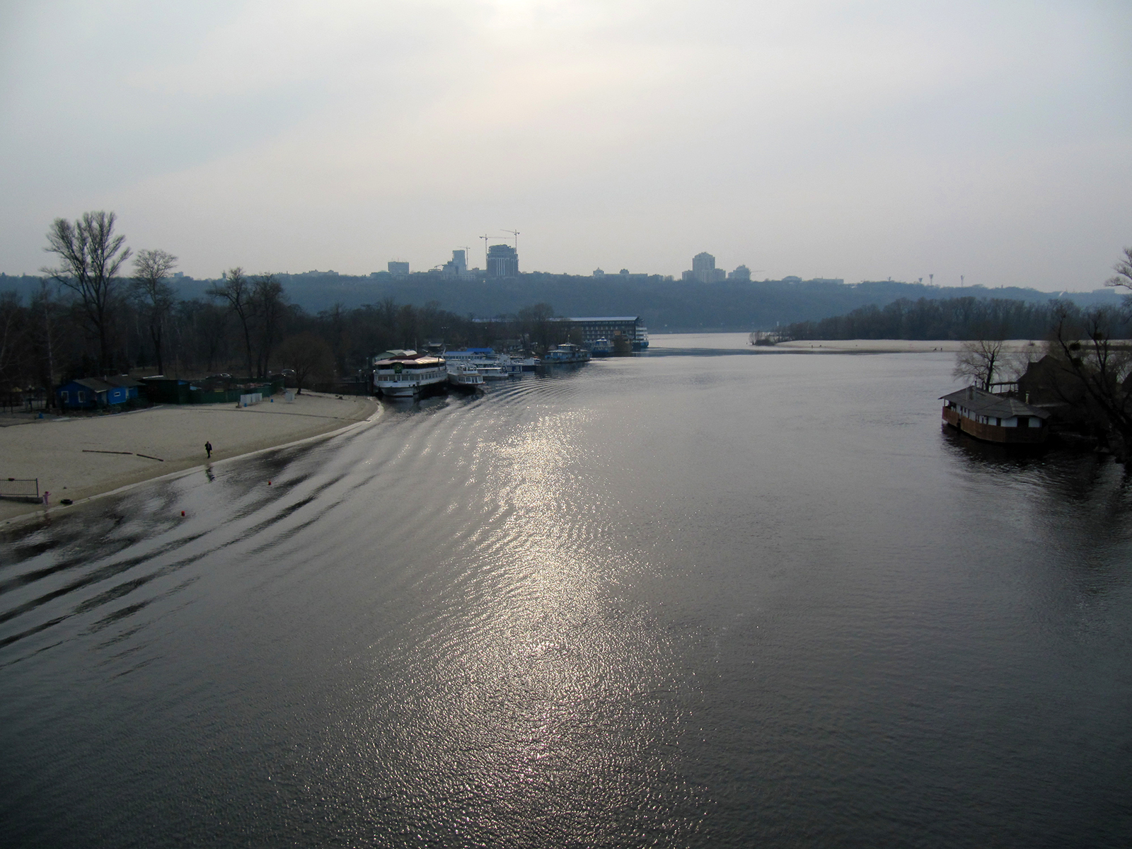 Венеціанська протока. Вид з мосту між Венеціанським та Долобецьким островами на Правий берег. Зліва Венеціанський острів (Гідропарк), праворуч Долобецький (ближче) та Труханів (далі) острови